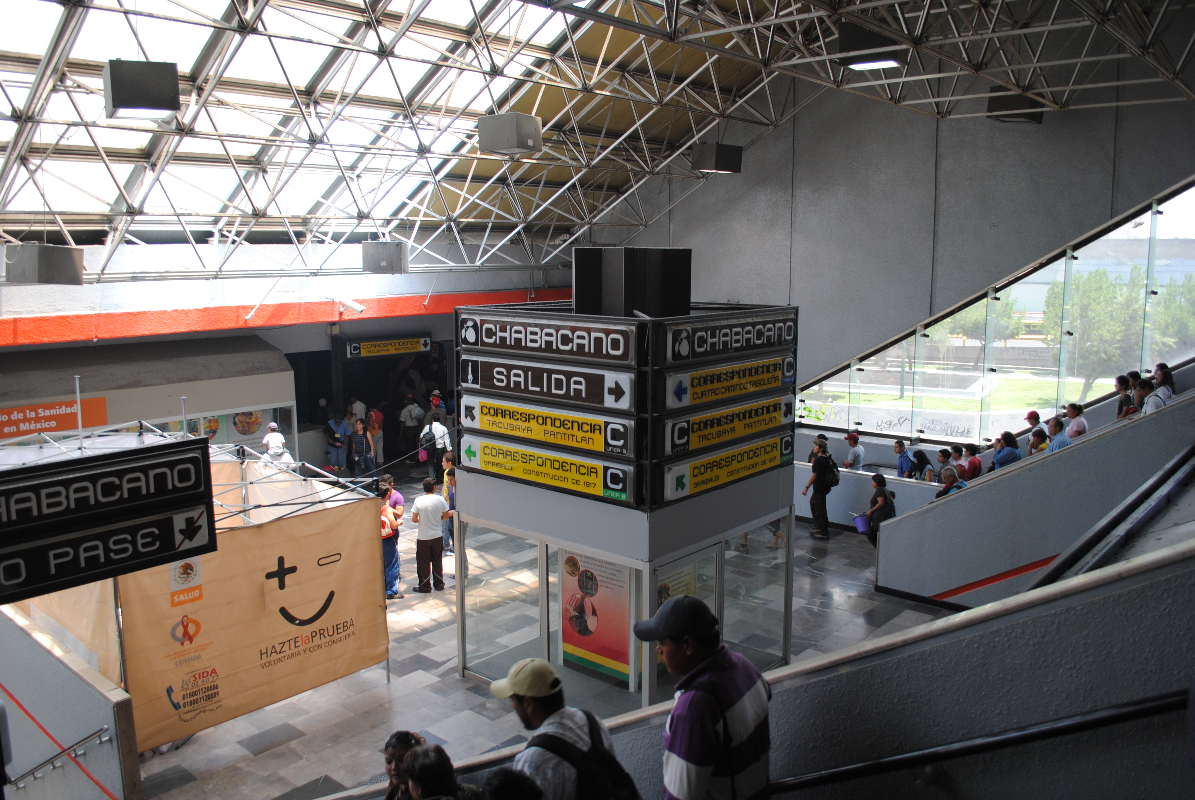 Transbordo en la estación Chabacano del Metro de la Ciudad de México